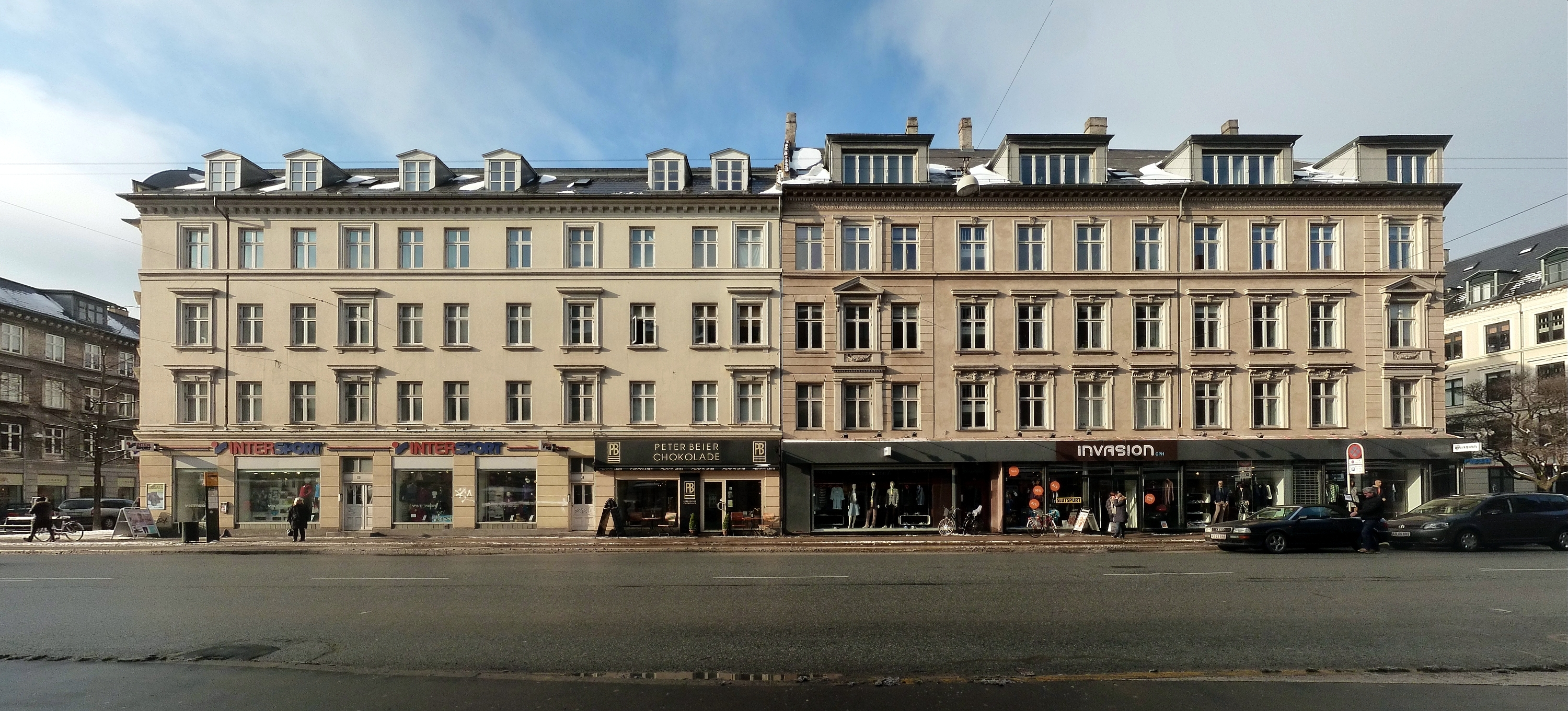 41 - 45 Falkoner Allé in Frederiksberg, Copenhagen, Denmark